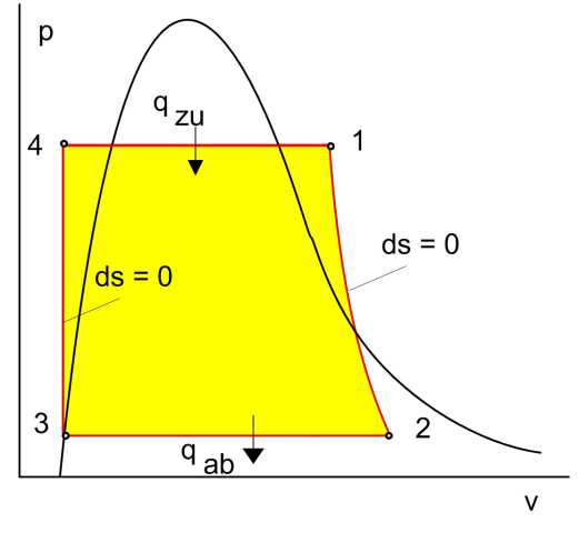 Clausius-Rankine-Prozess, p-v-Diagramm